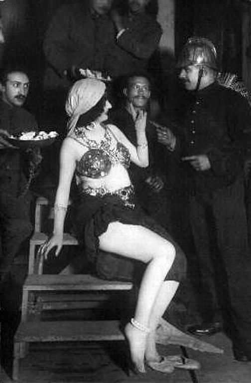 Mata-Hari(?) à Paris en 1916